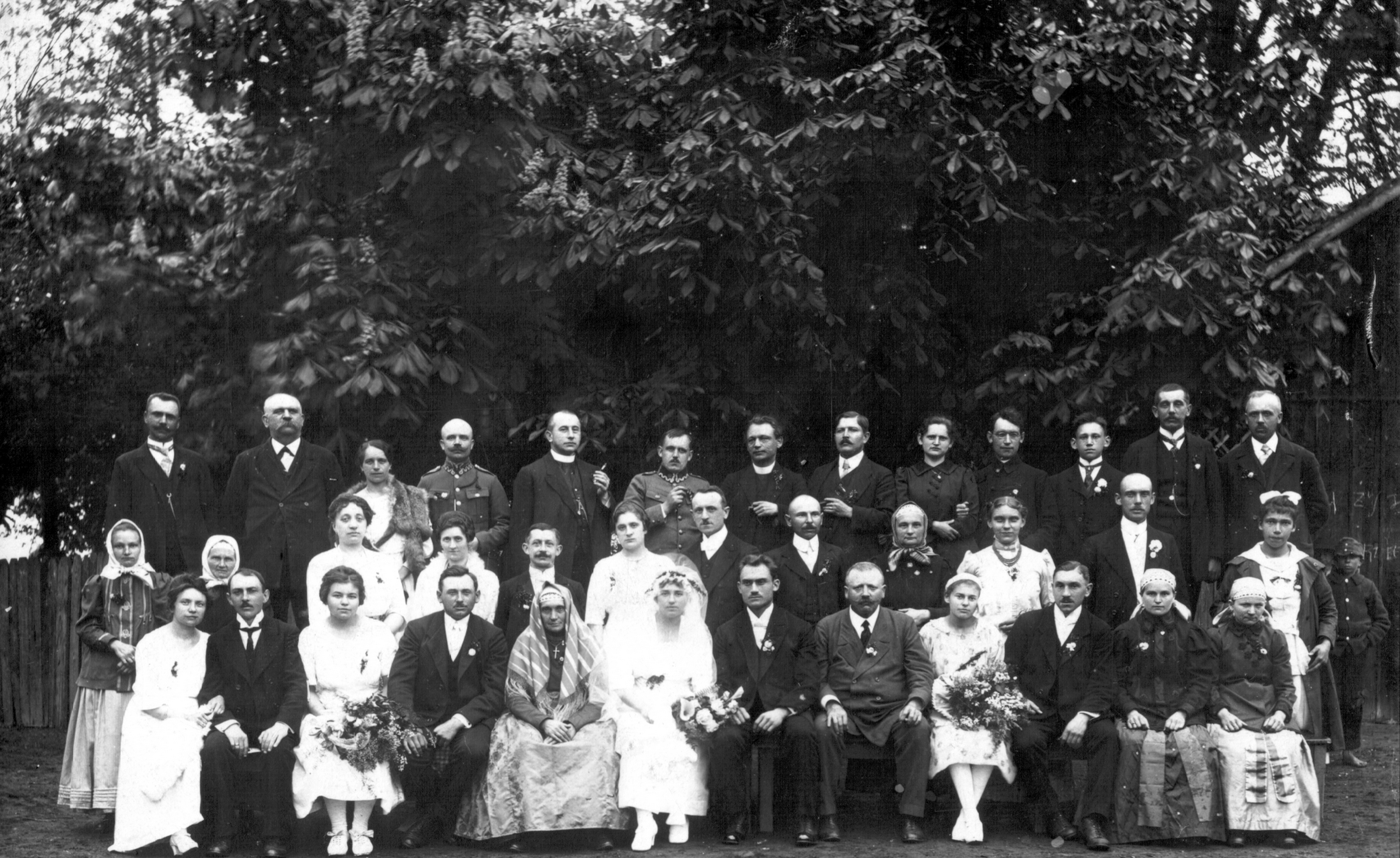 Dziedzice, 4 maja 1920 roku, wesele Marii i Stanisława Krzyżowskich (siedzą w środku). Na fotografii widać też m.in. Jana Stryczka, ojca Marii (piąty od prawej w pierwszym rzędzie), Annę Krzyżowską, matkę Stanisława (piąta od lewej w pierwszym rzędzie), Emilię Stryczek, siostrę Marii (pierwsza od lewej w pierwszym rzędzie), Antoniego Kotziana (drugi od lewej w pierwszym rzędzie), Anielę Stryczek, siostrę Marii (czwarta od prawej w pierwszym rzędzie), Stefana Krzyżowskiego, brata Stanisława (drugi od prawej w drugim rzędzie), Martę Krzyżowską, siostrę Stanisława (trzecia od prawej w drugim rzędzie), Pawła Krzyżowskiego, brata Stanisława (trzeci od prawej w trzecim rzędzie), Jana Kędziora z żoną Marią (szósty i siódma od prawej w drugim rzędzie) i ks. Faustyna Herrmanna (czwarty od prawej w trzecim rzędzie)